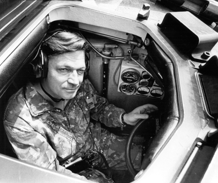 Daniel Müller, Balsthal, FDP-Nationalrat (Schweiz) im Panzer 68